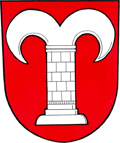 Česky: Rohov /okres Opava/